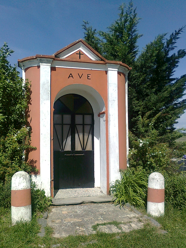 Castel Goffredo, edicola sacra strada Gambina Sotto.